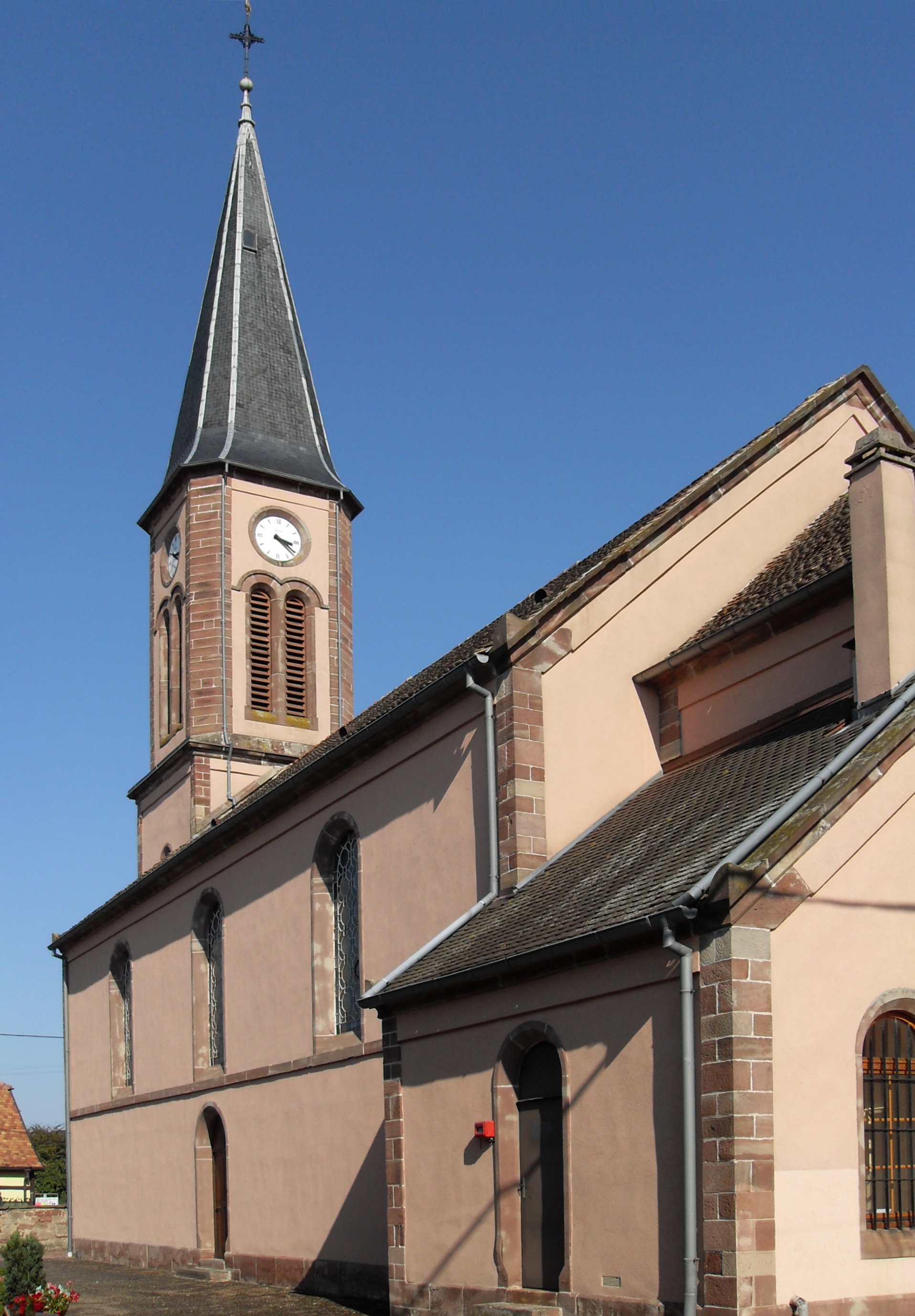 L'église Saint-Arbogast à Richtolsheim